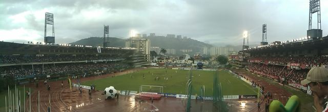 Partido de la 13º fecha del Torneo Apertura 2010. Domingo, 14 de noviembre de 2010.